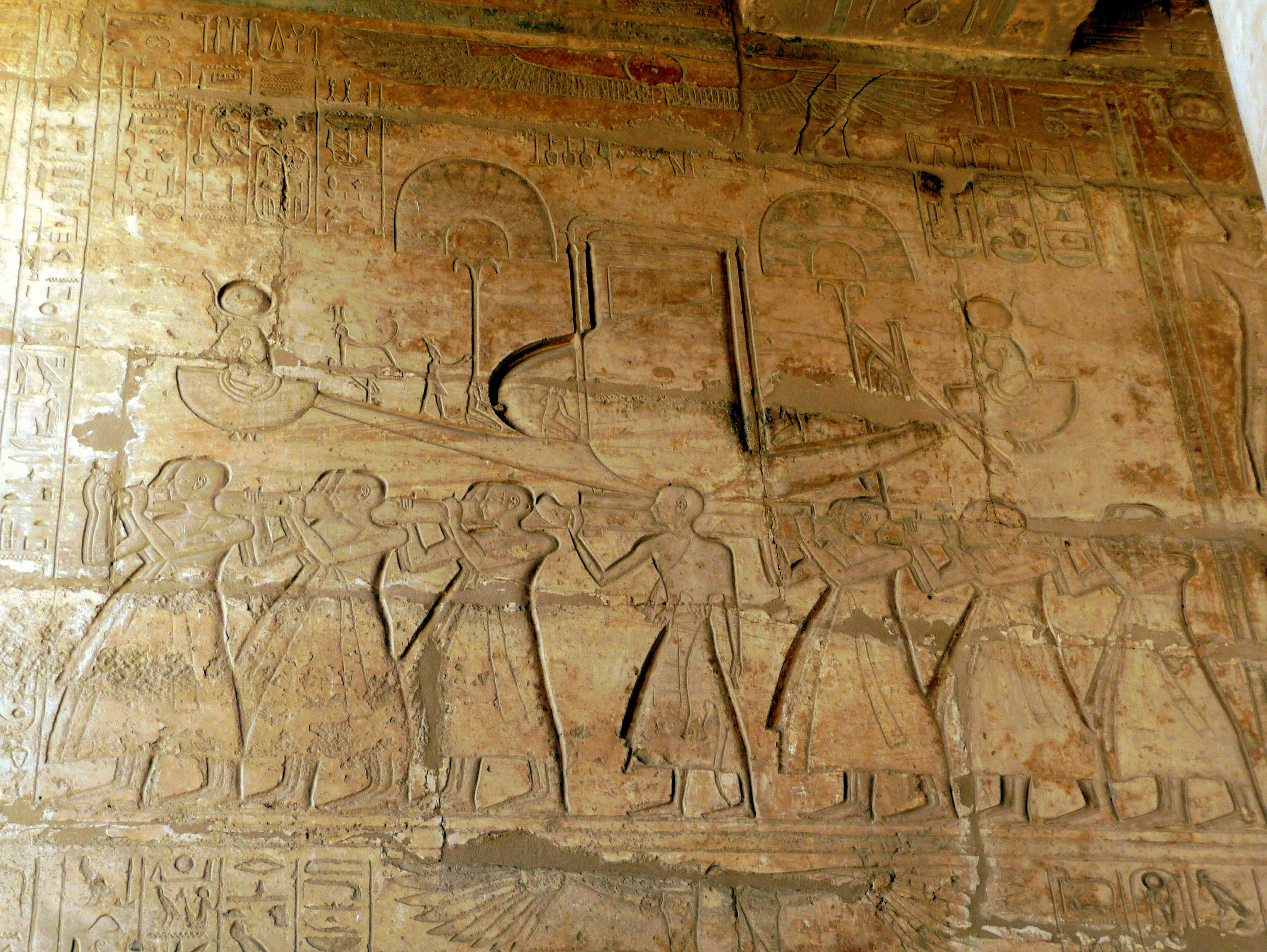 Ramesses II Temple